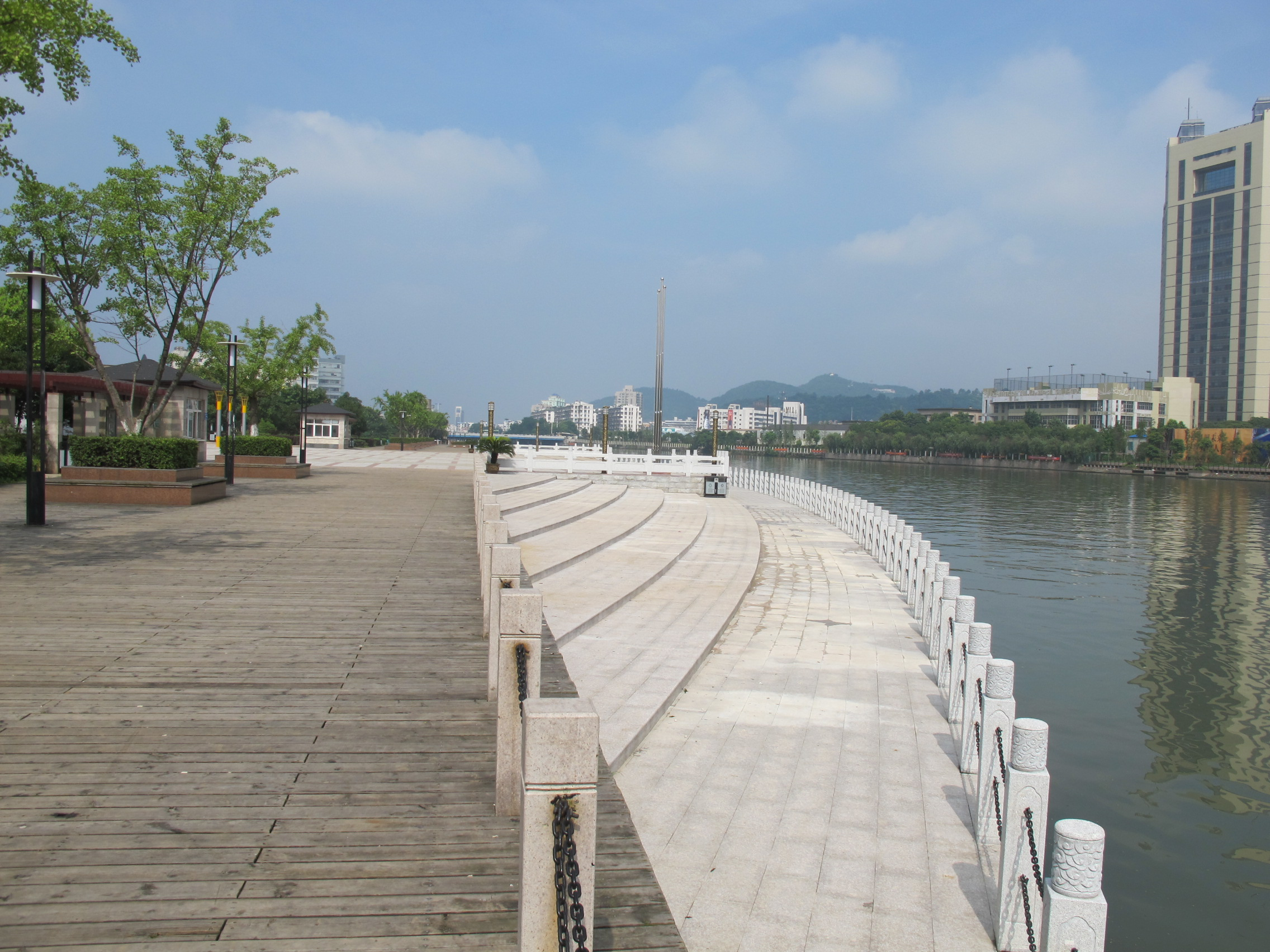 会昌河国脉公园